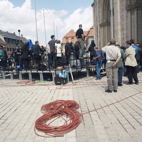 Medienschaffende